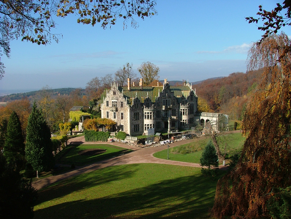 Schloss Altenstein 2005 Foto: Thomas Lückert